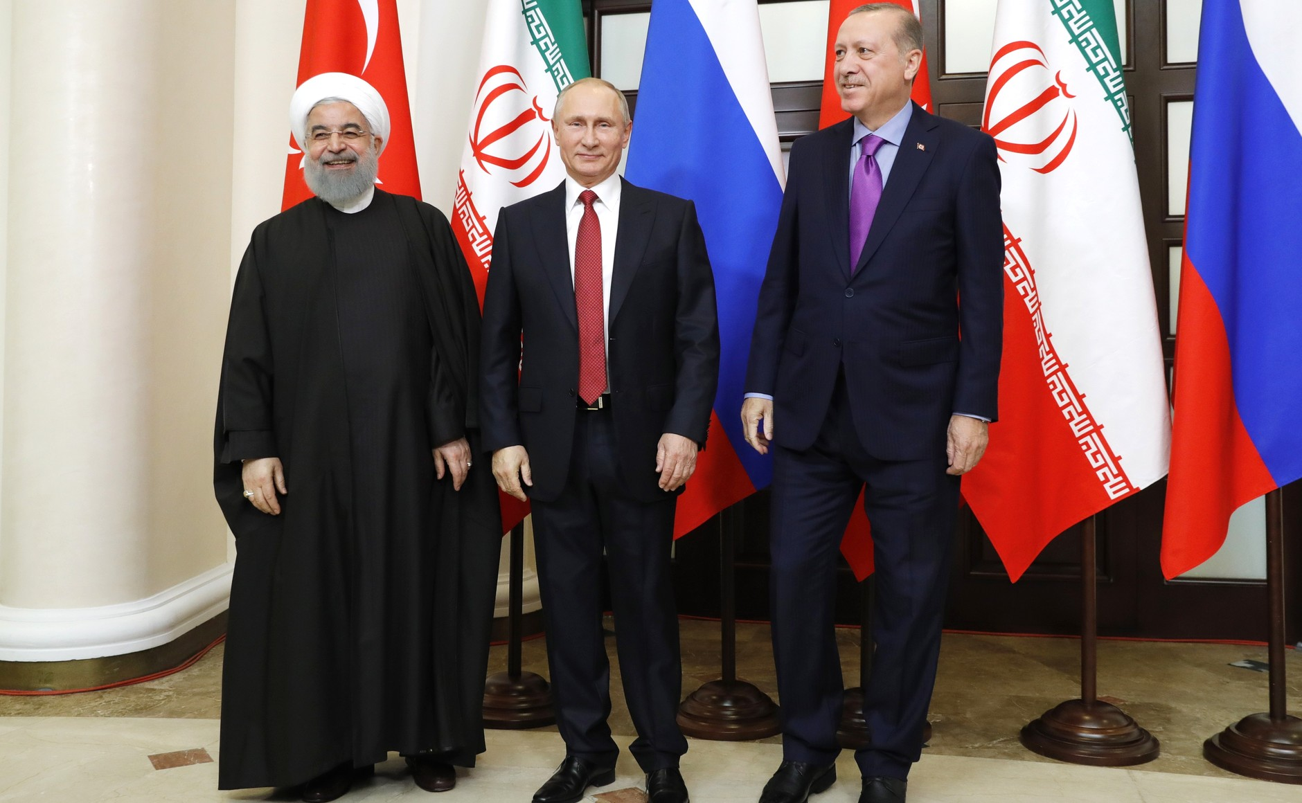 Встреча Президента России Владимира Путина с Президентом Ирана Хасаном Рухани и Президентом Турции Реджепом Тайипом Эрдоганом в Сочи. Переговоры посвящены проблематике сирийского урегулирования.